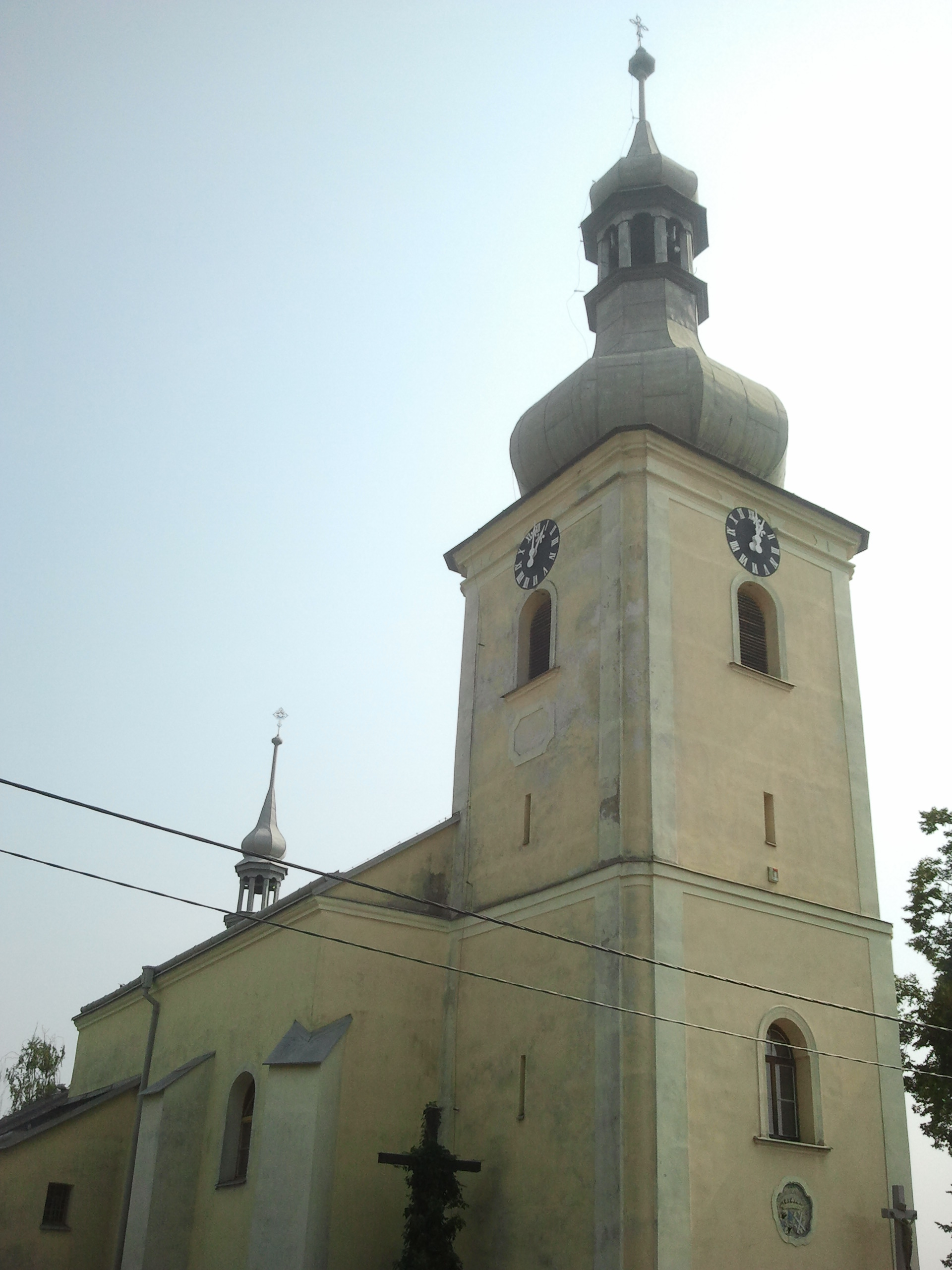 Kostel sv. Václava (Velká Polom), Velká Polom